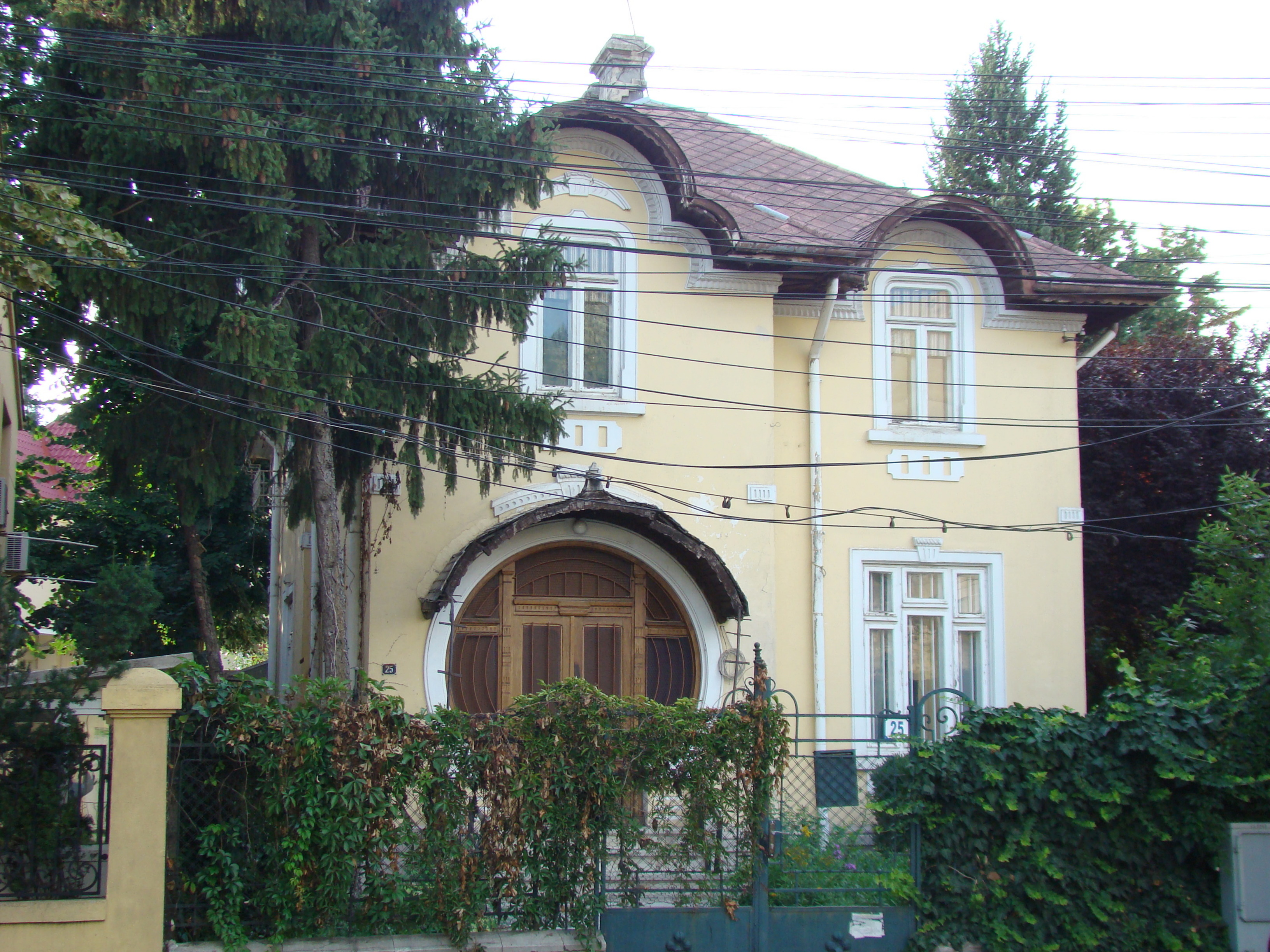 Clădire monument istoric, str. Paris, nr 25